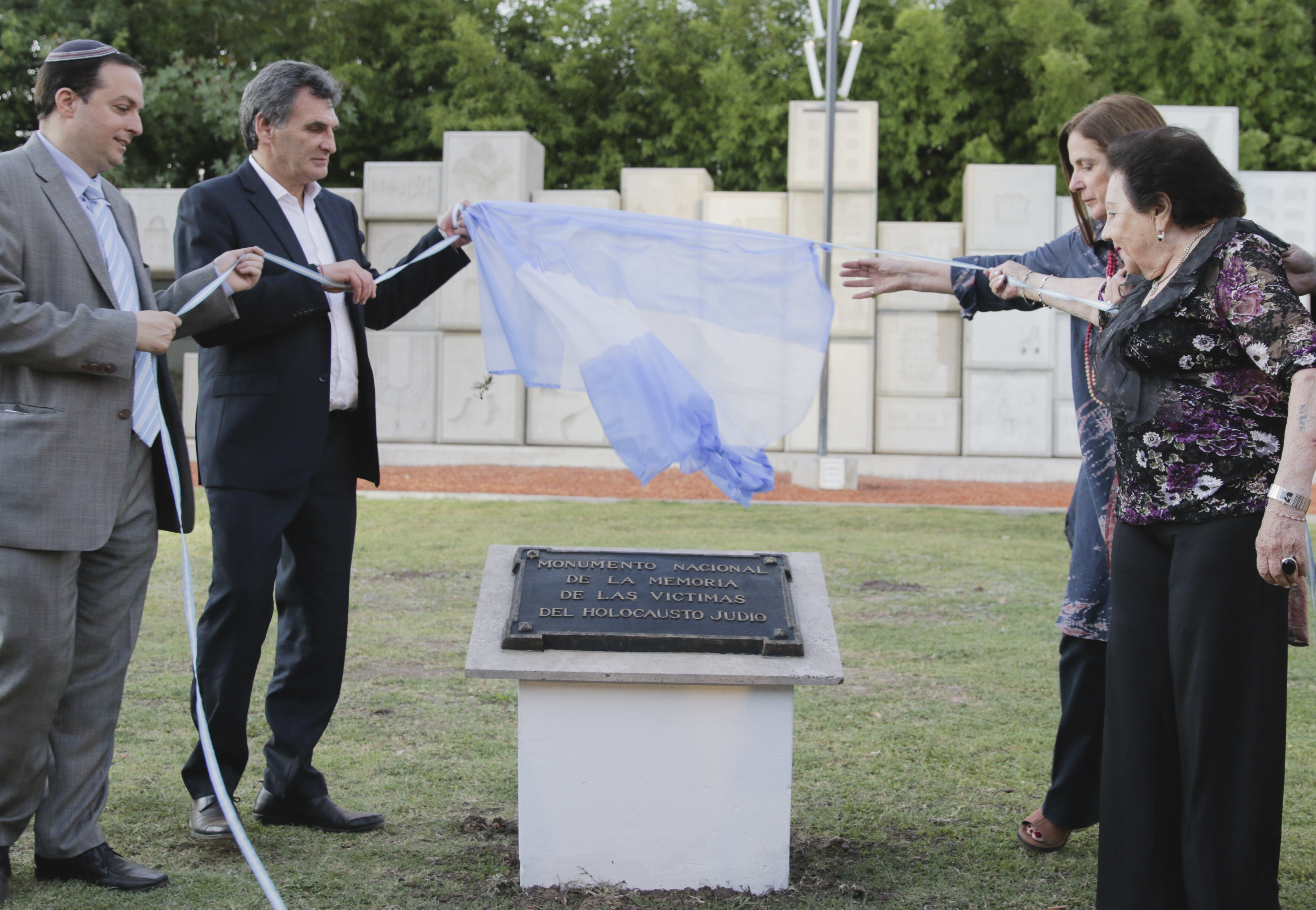 Claudio Avruj junto a representantes de la comunidad judía en el Monumento Nacional en Memoria a las Víctimas del Holocausto